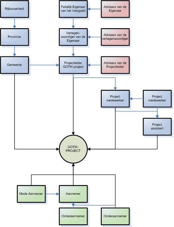 Organisatieschema Projectleiding GOTIK project